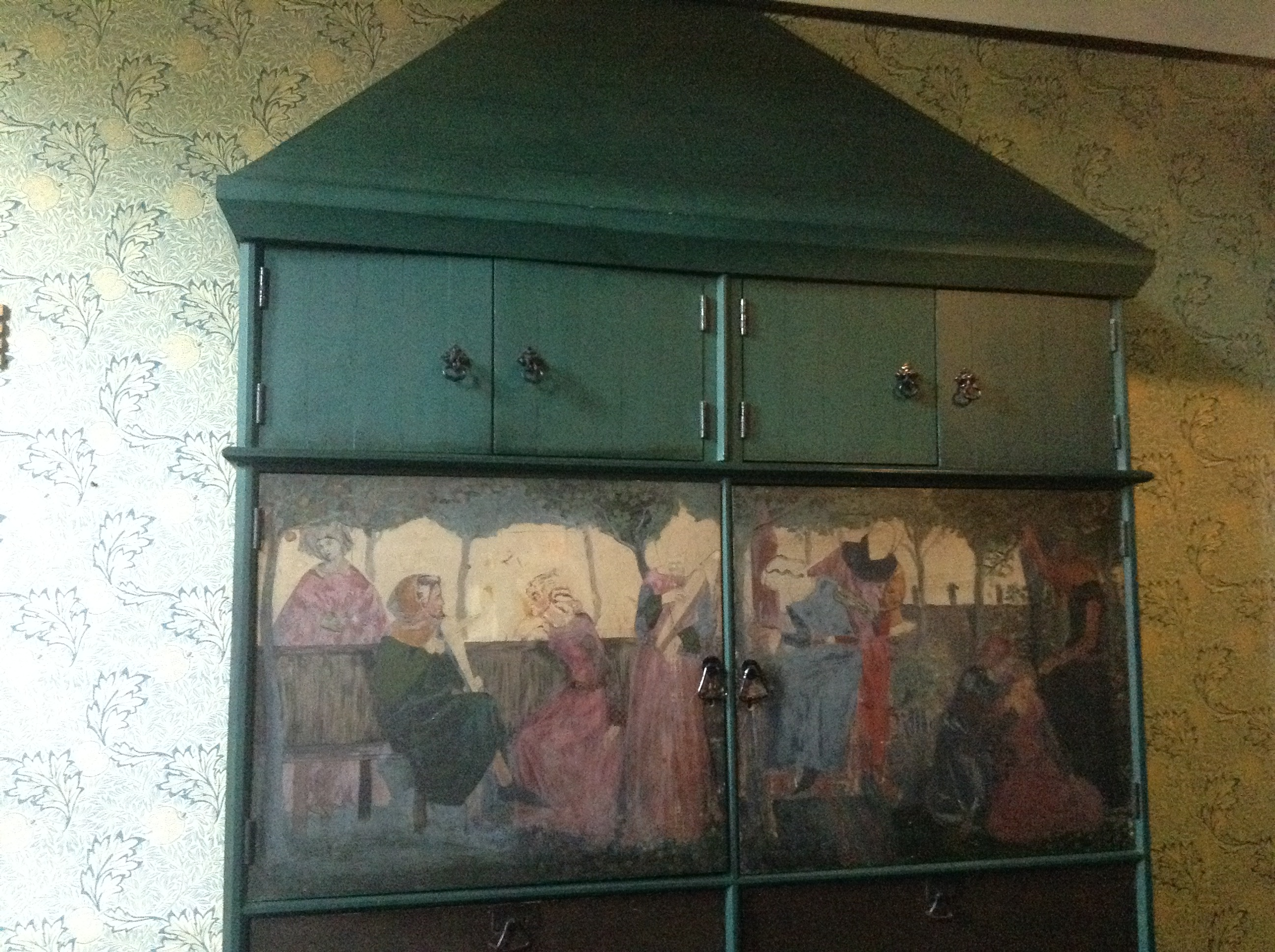 Dodrefn yn y Tŷ Coch